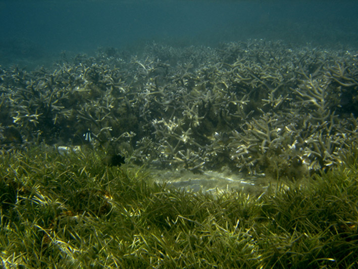 Syringodium isoetifolium (Plante magnoliophyte) et Acropora sp. (Corail dur)